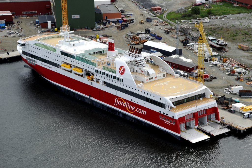 Stavangerfjord